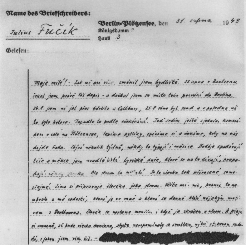 Poslední dopis Julia Fučíka z berlínské věznice